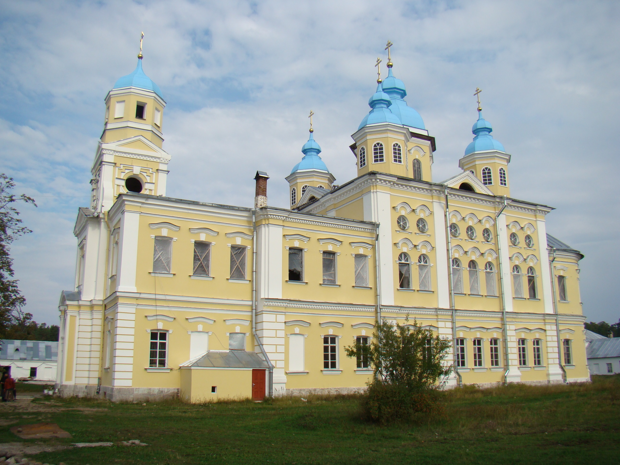 Собор Рождества Пресвятой Богородицы: о.Коневец, Приозерский район, Ленинградская область